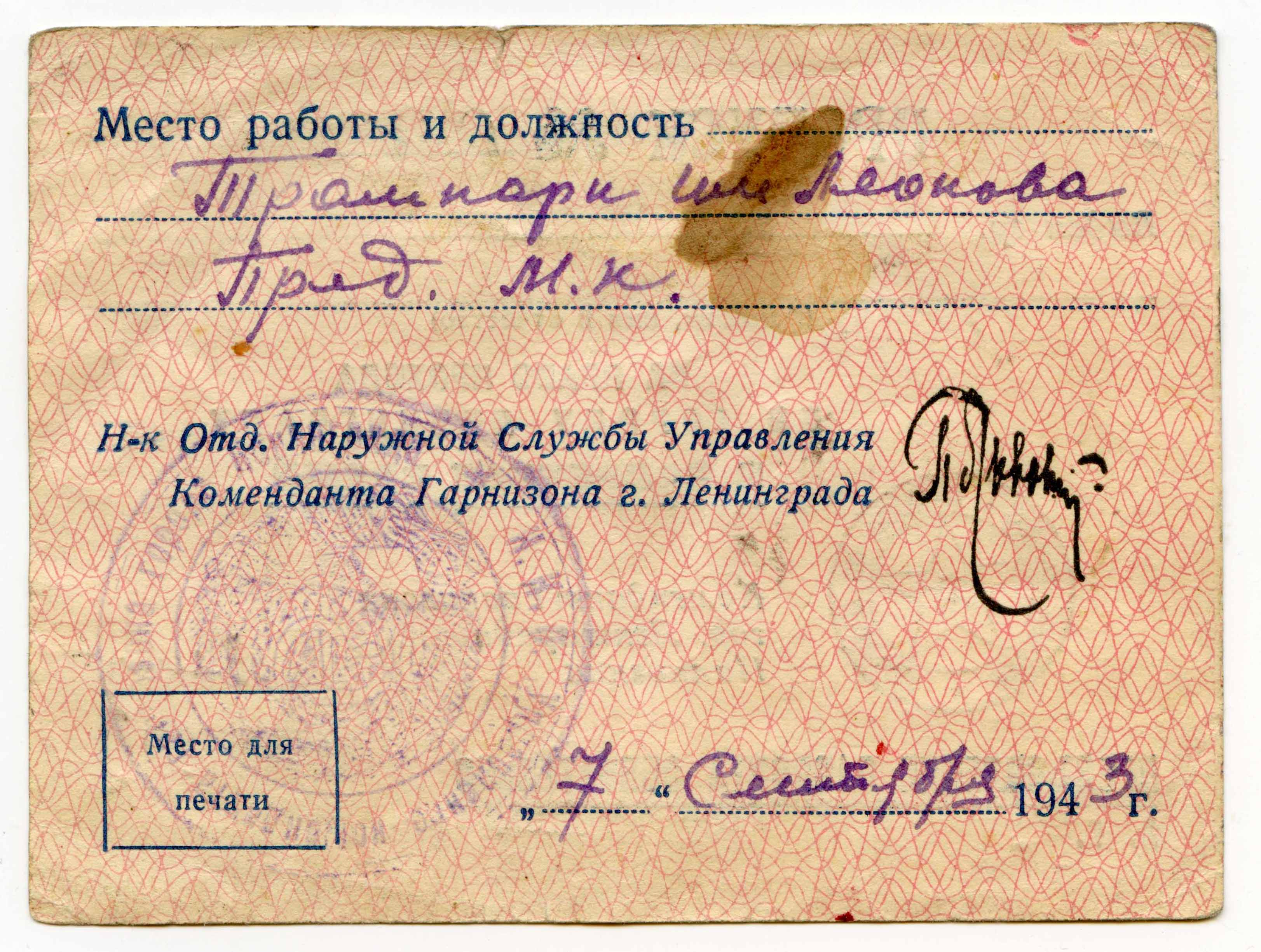 Пропуск 08366 блокадного Ленинграда на право прохода по городу в комендантский час. 17 сентября 1943 года. обратная сторона. Выписан для председателя месткома (м.к.) трамвайного парка имени Леонова гражданки (гр.) Масловой.